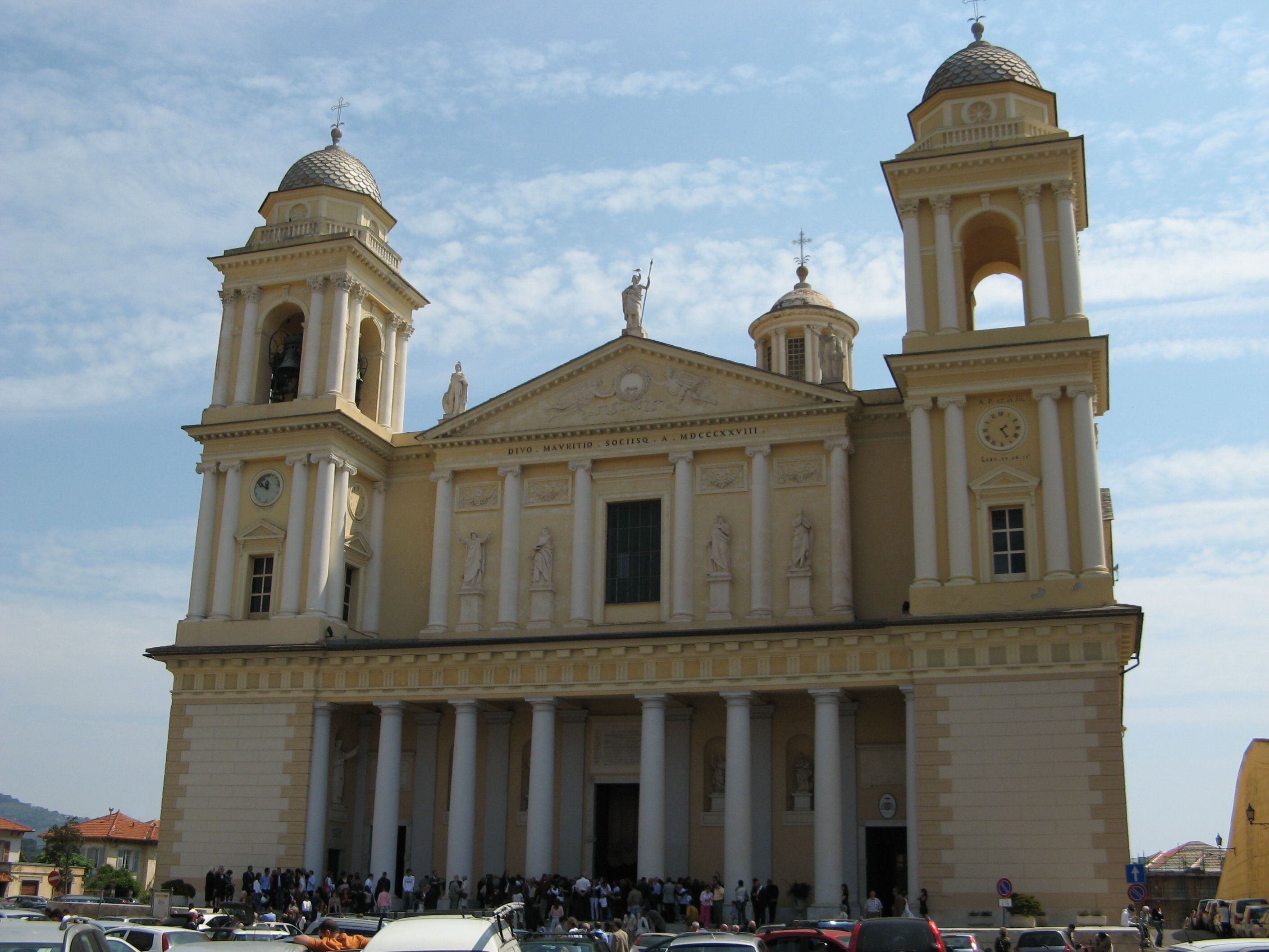 Duomo di S.Maurizio, Porto Maurizio, Imperia, Italy